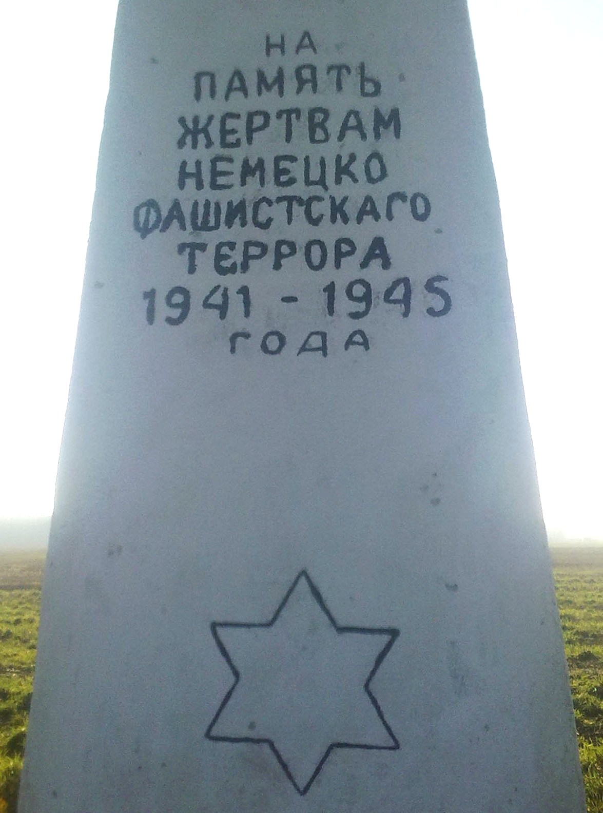 Надпись на памятнике убитым евреям - узникам гетто в поселке Томашовка Брестского района. Памятник установлен в 1954 году.